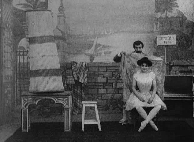 Méliès, L'illusioniste fin-de-siècle (Star Film 183, 1899)